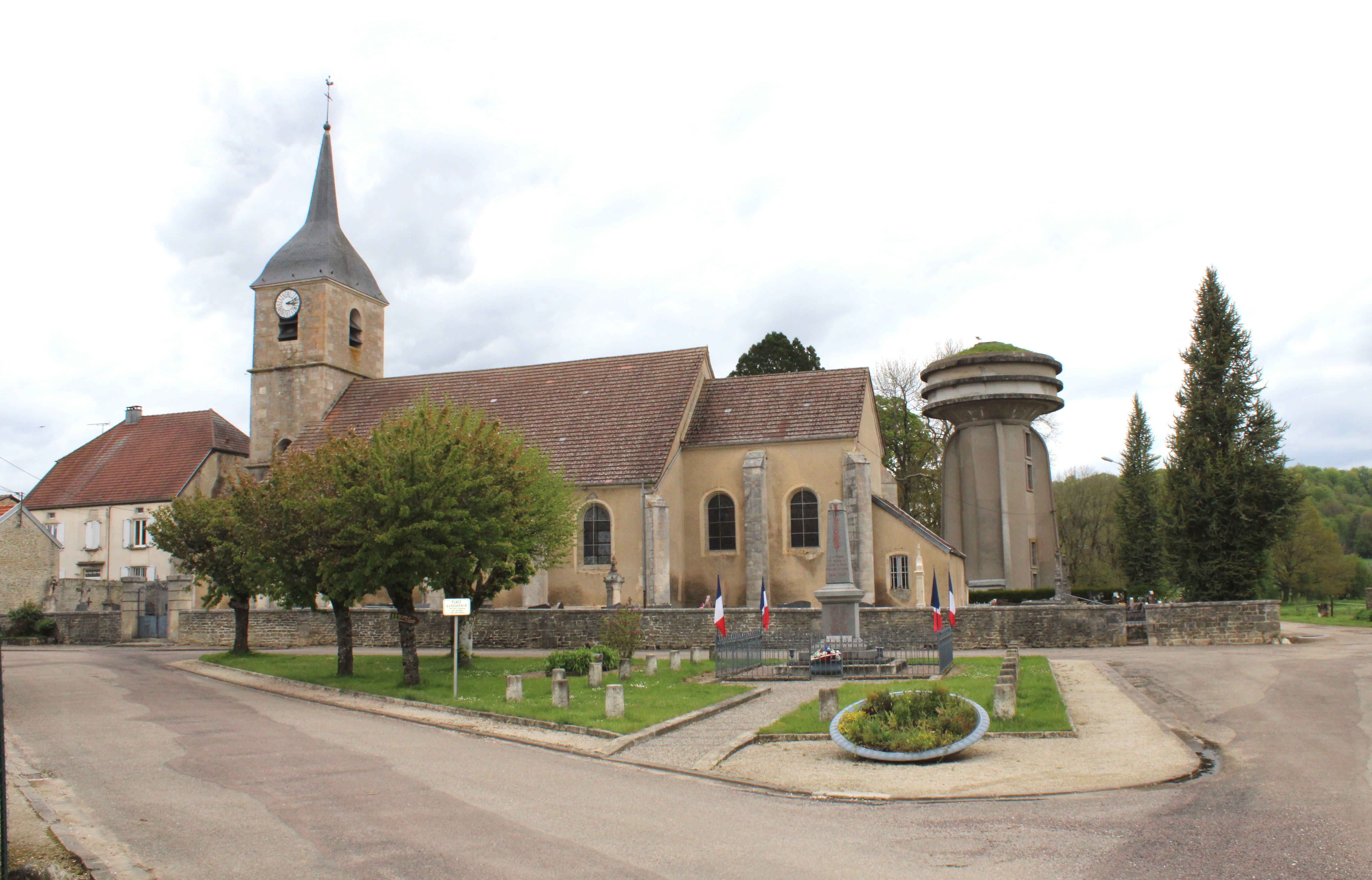 La place de l'église.